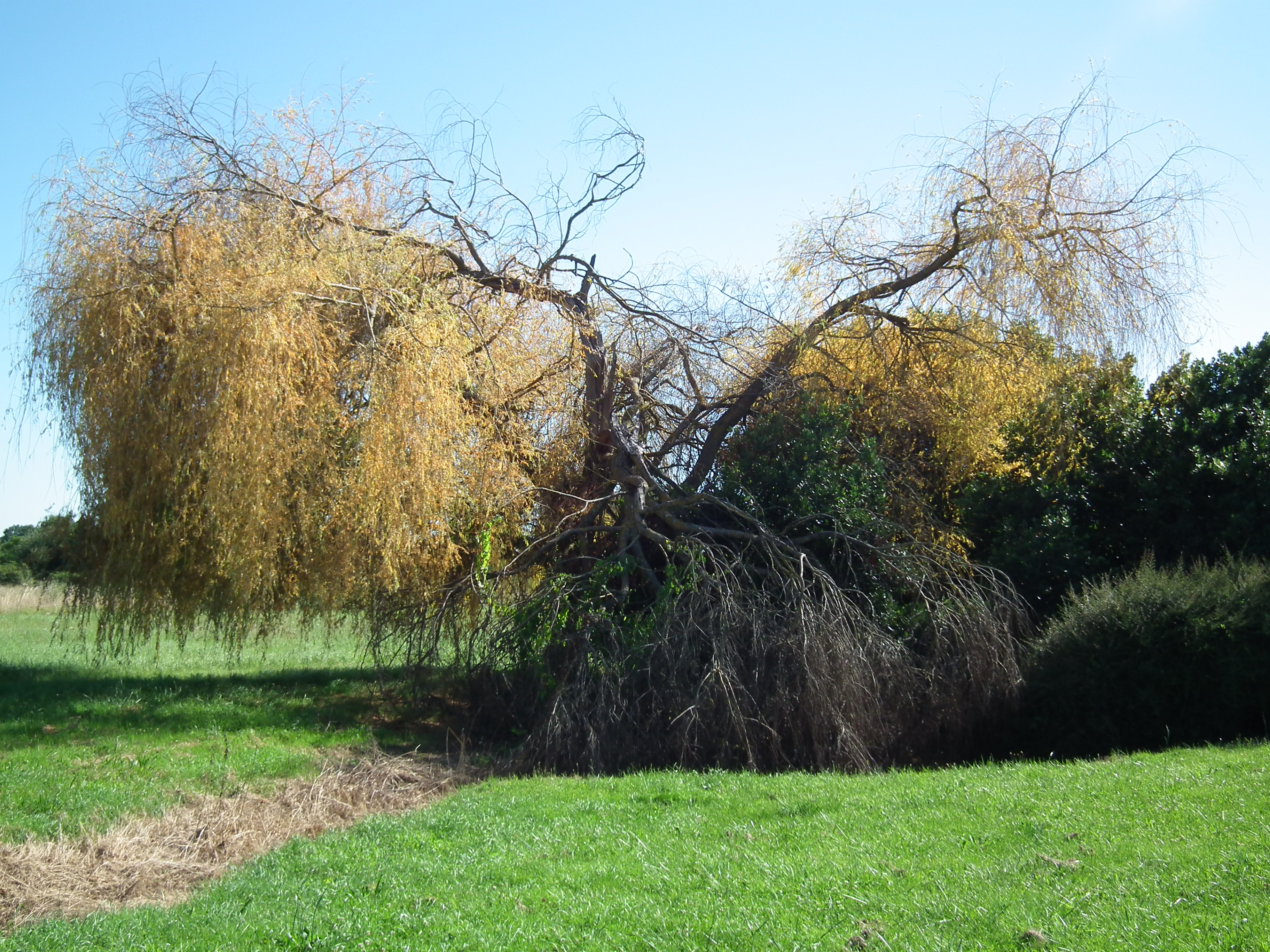 Vieil arbre à Agudelle